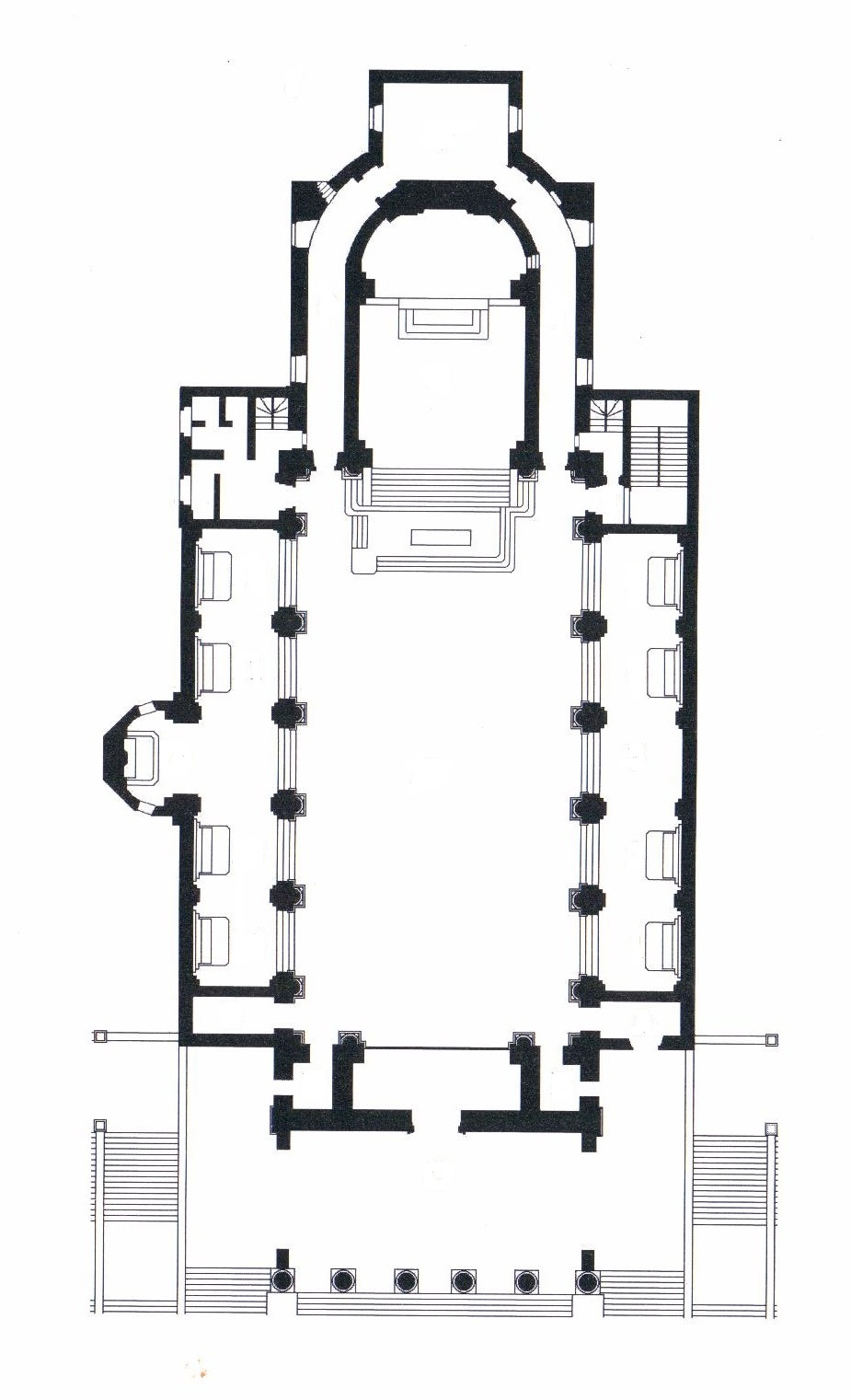 Piantina del duomo di Schio